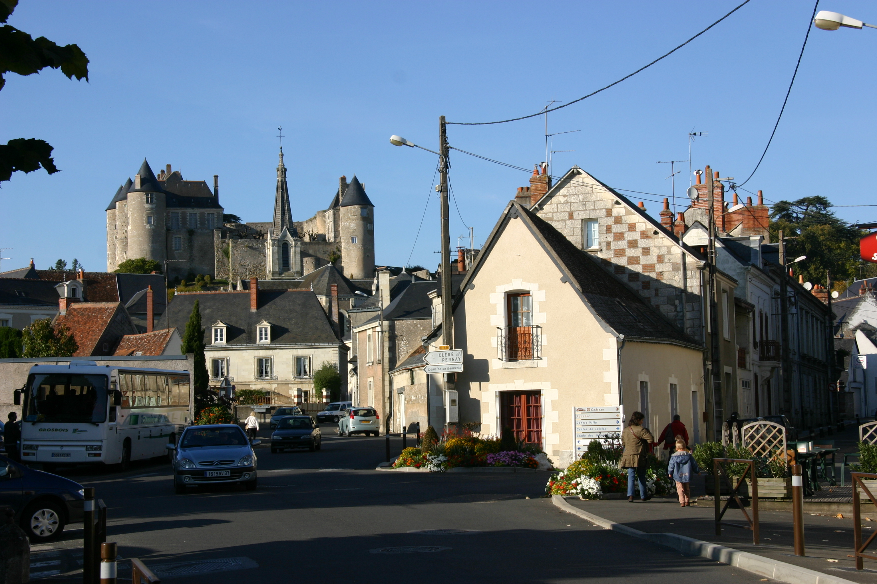 Schloss Luynes